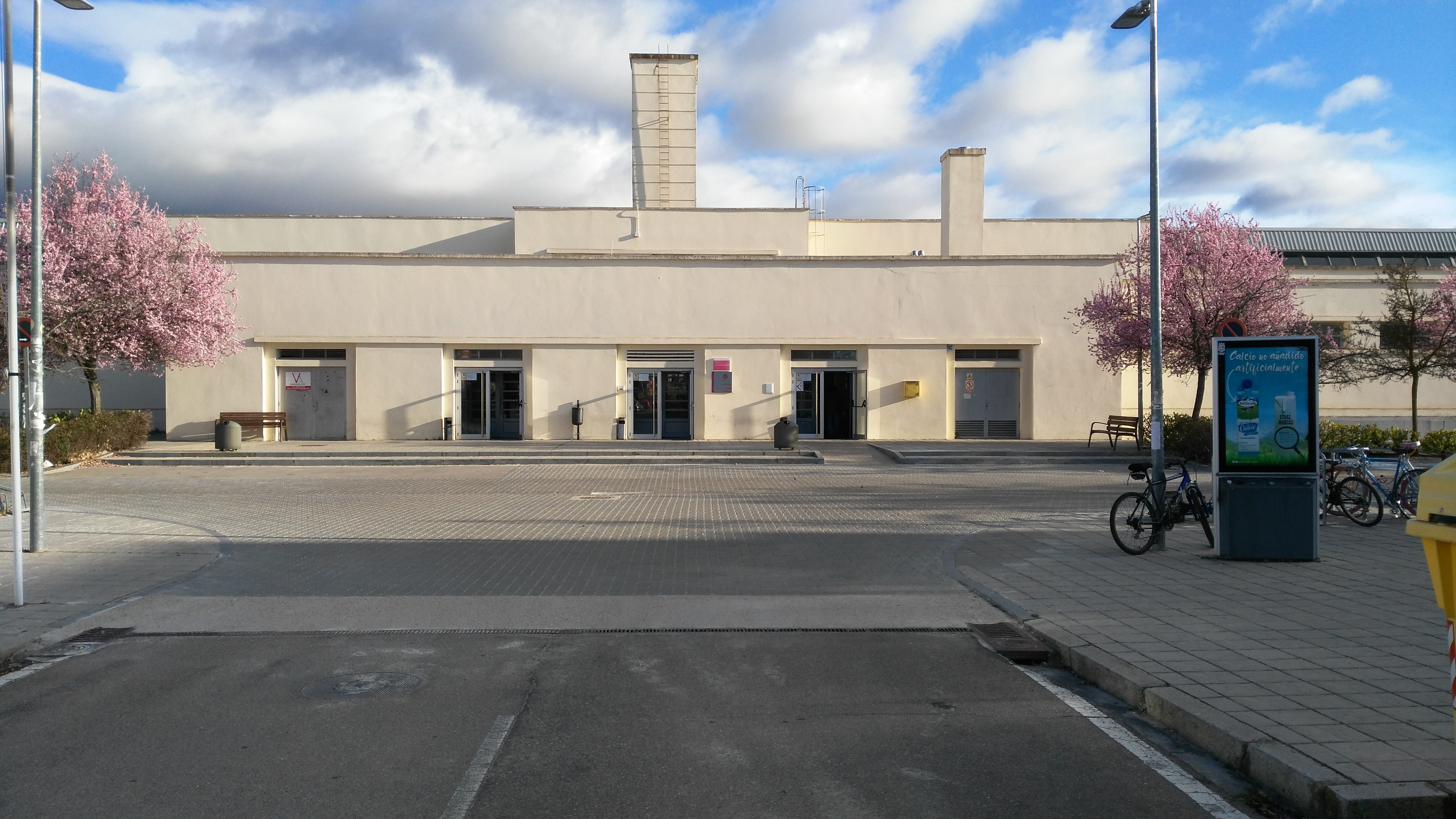 Fachada del aulario del Campus de la Yutera (Universidad de Valladolid) tomada el 13 de marzo de 2017